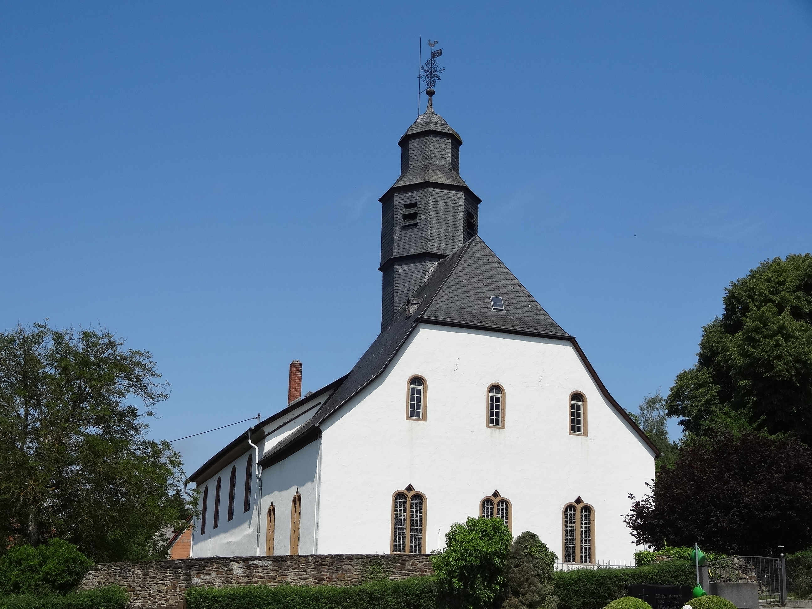 Evangelische Pfarrkirche (Münster, Butzbach)